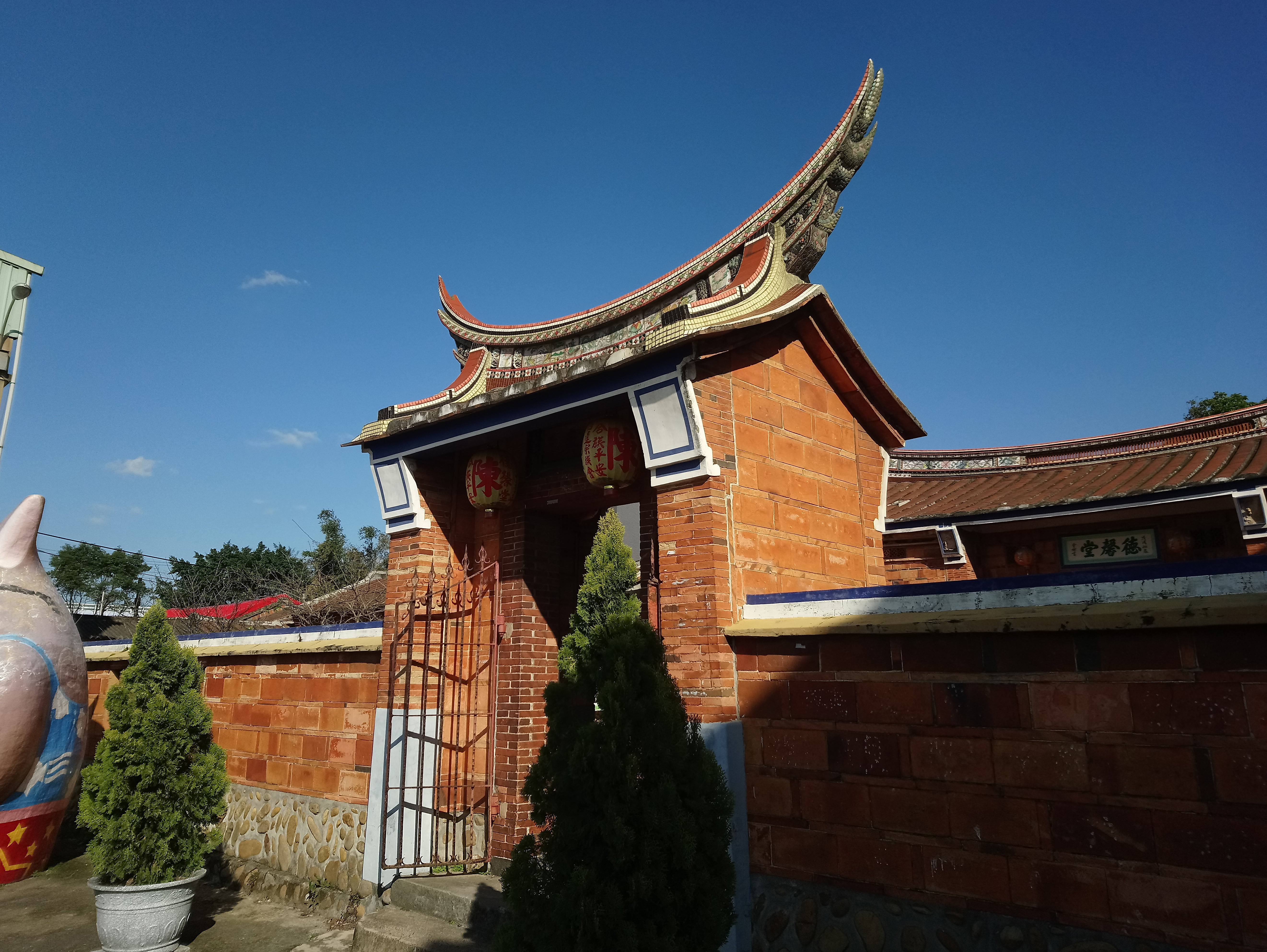 蘆竹德馨堂門樓,桃園市蘆竹區南崁地區山鼻里